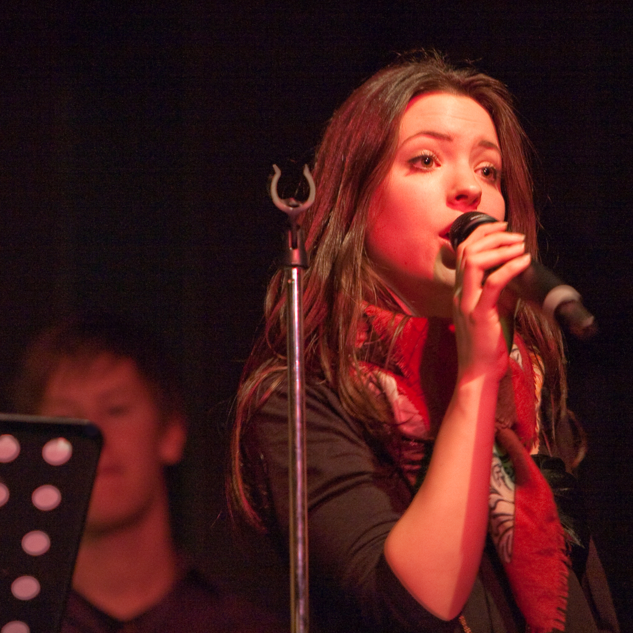 Carla Abrahamsen in Mamma Mia, Vaxholm, Sweden 2010